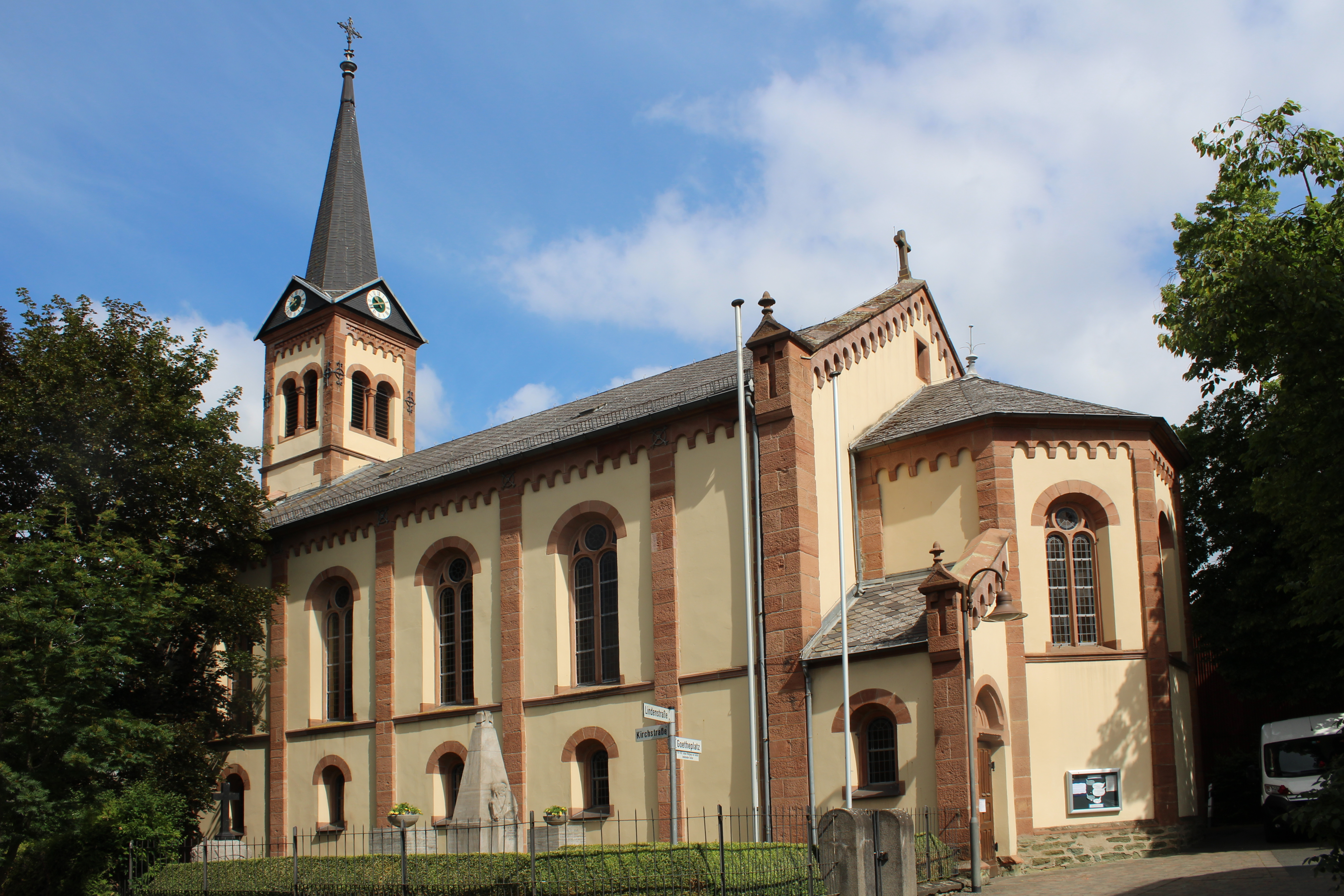 Ev. Kirche Garbenheim, Wetzlar, Lahn-Dill-Kreis, Hessen, Deutschland